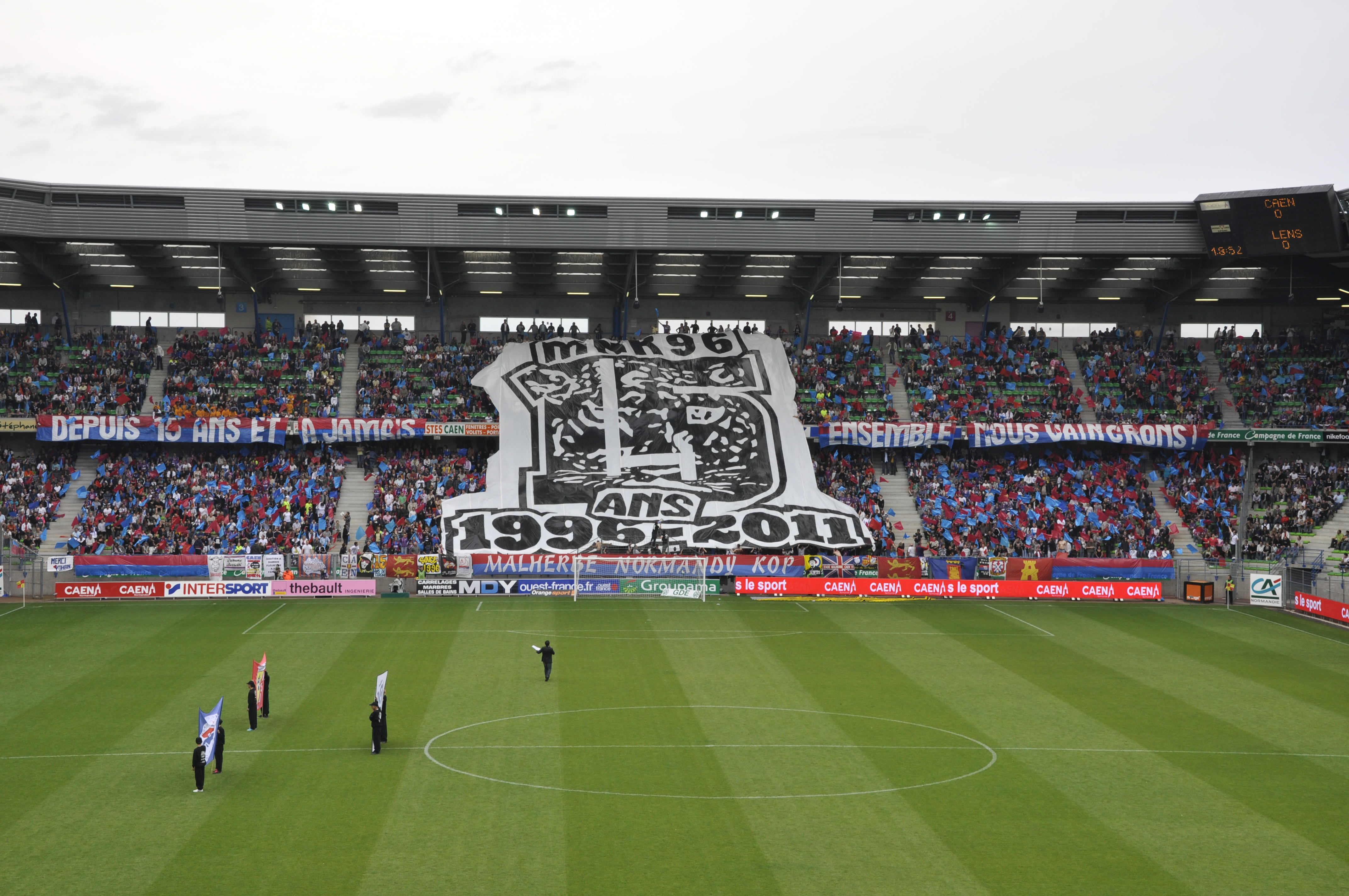 Tifo des 15 ans du Malherbe Normandy Kop le 7 mai 2011 face à Lens